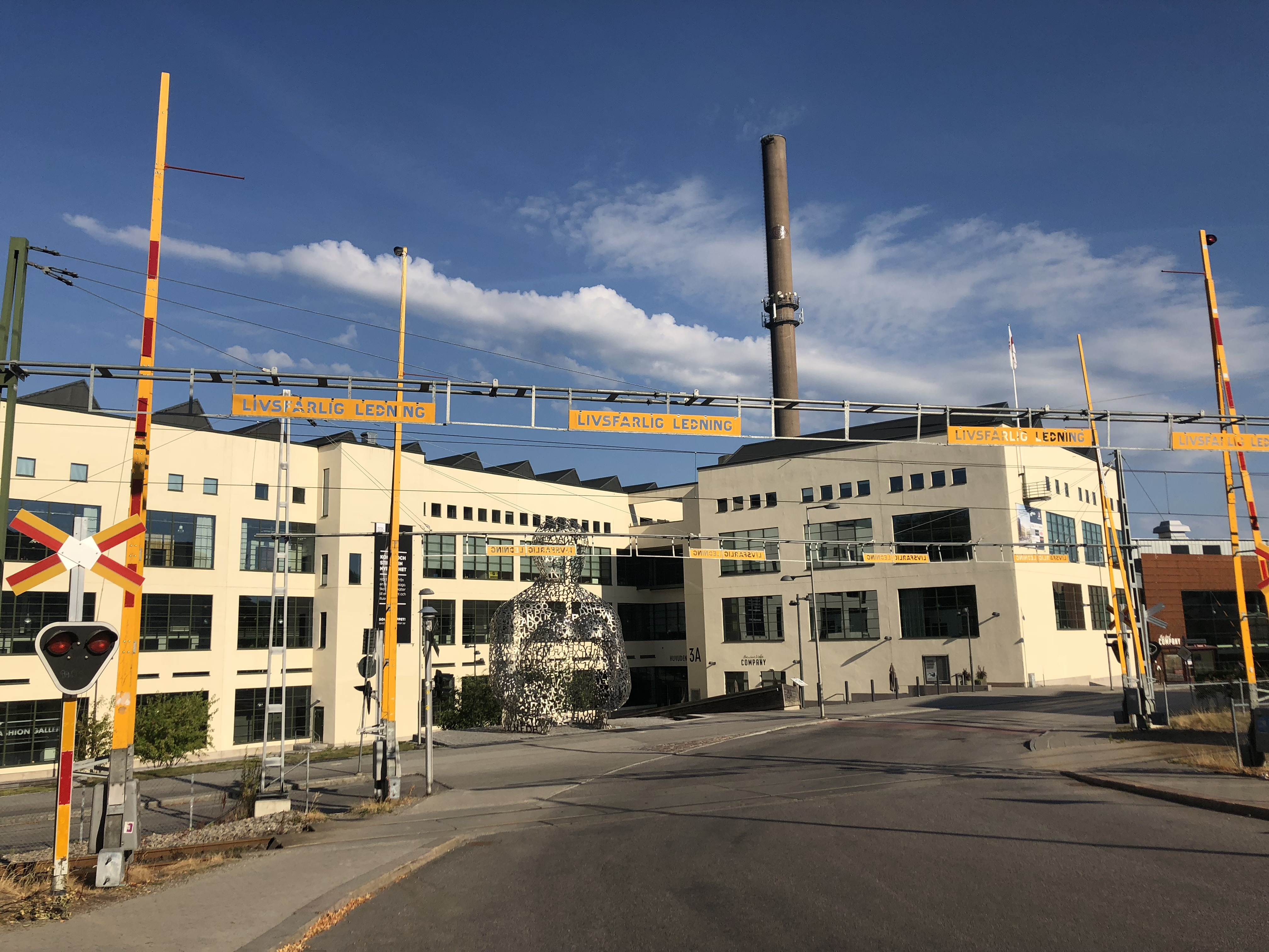 Textile Fashion Center, Borås, med skulpturen House of knowledge av Jaume Plensa. I förgrunden järnvägskorsning vid Kust till kust-banan